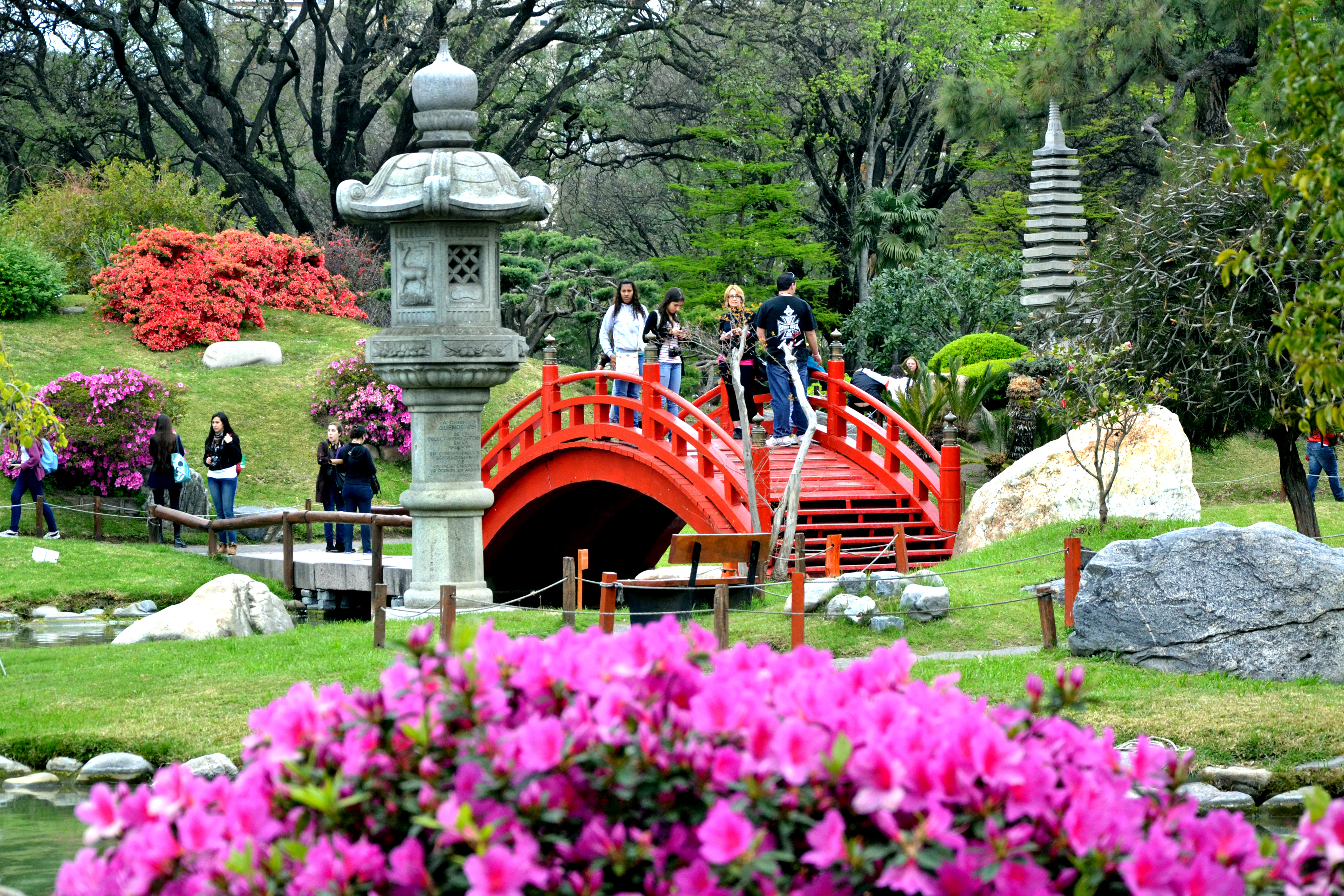 Jardin Japones